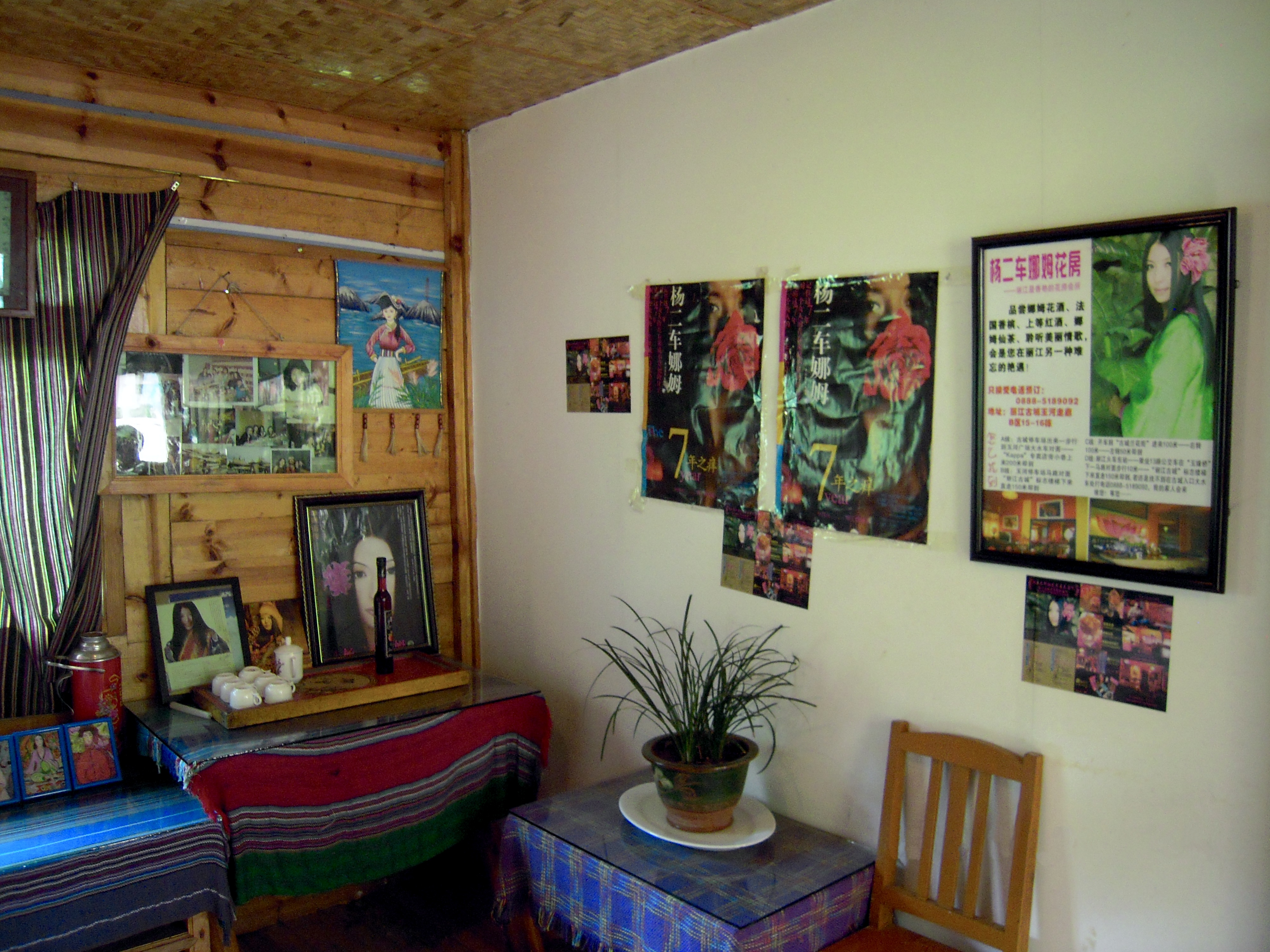 中文（中国大陆）: 杨二车娜姆出生地，位于四川省盐源县